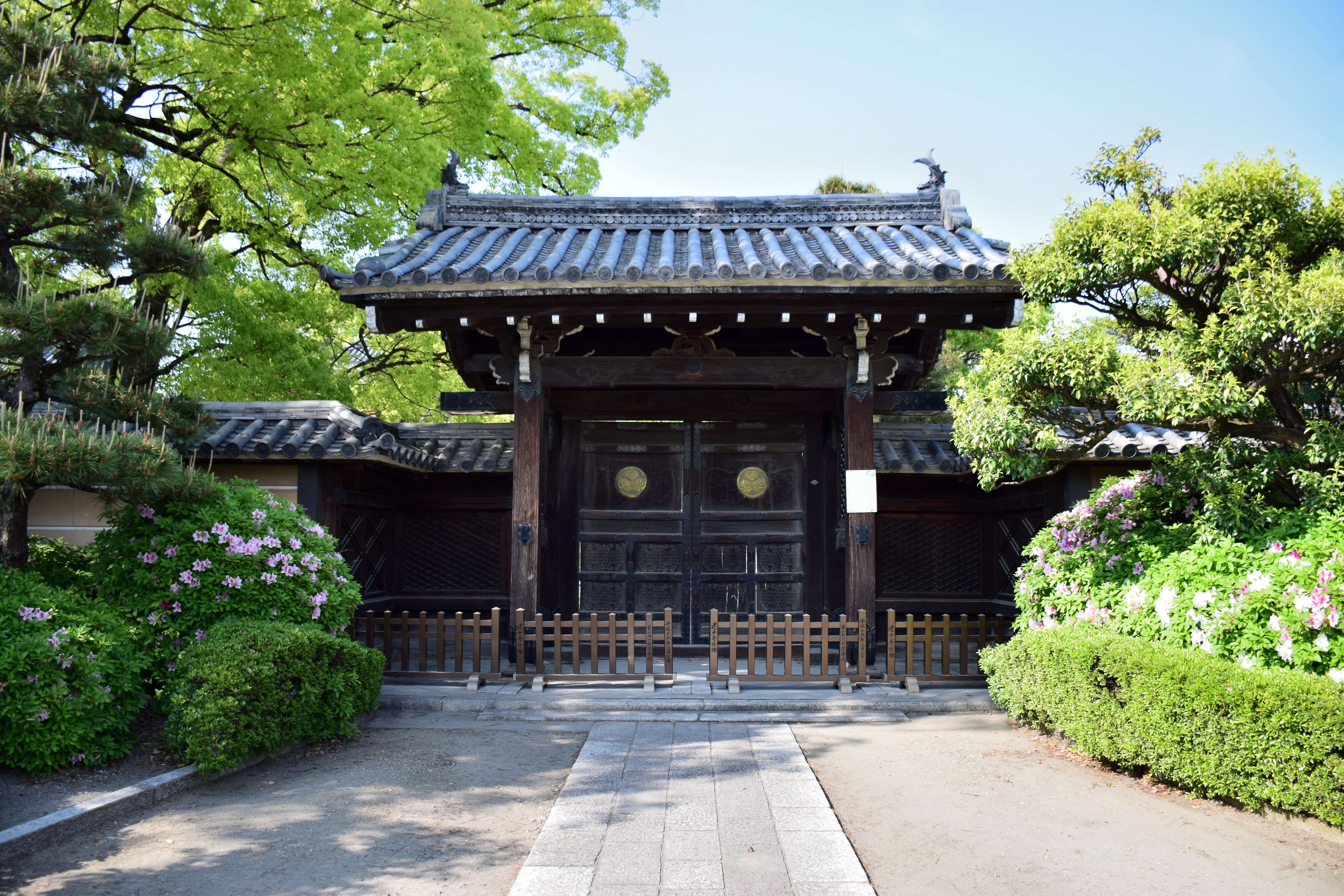 建中寺御成門